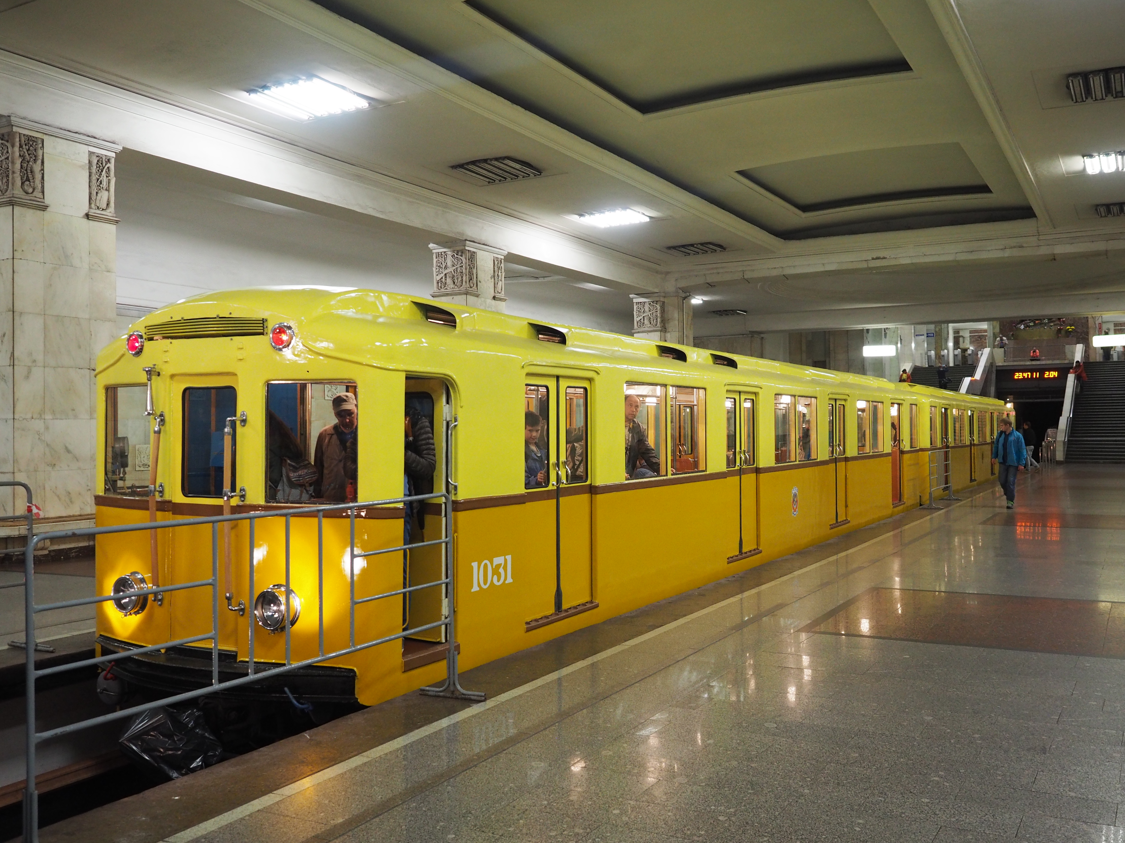 Музейный метровагон А 1031. Выставка подвижного состава и парад поездов к 80-летию Московского метрополитена 15 мая 2015 года. On May 15 and 16, 2015, Moscow Metro celebrated its 80th anniversary. For the first time, recently restored historical cars were exhibited at the siding track of Partizanskaya station. 15 и 16 мая 2015 в Москве отмечалось 80 лет Московскому метро. Впервые была устроена выставка исторических вагонов. Они были расставлены на 3 пути станции Партизанская.